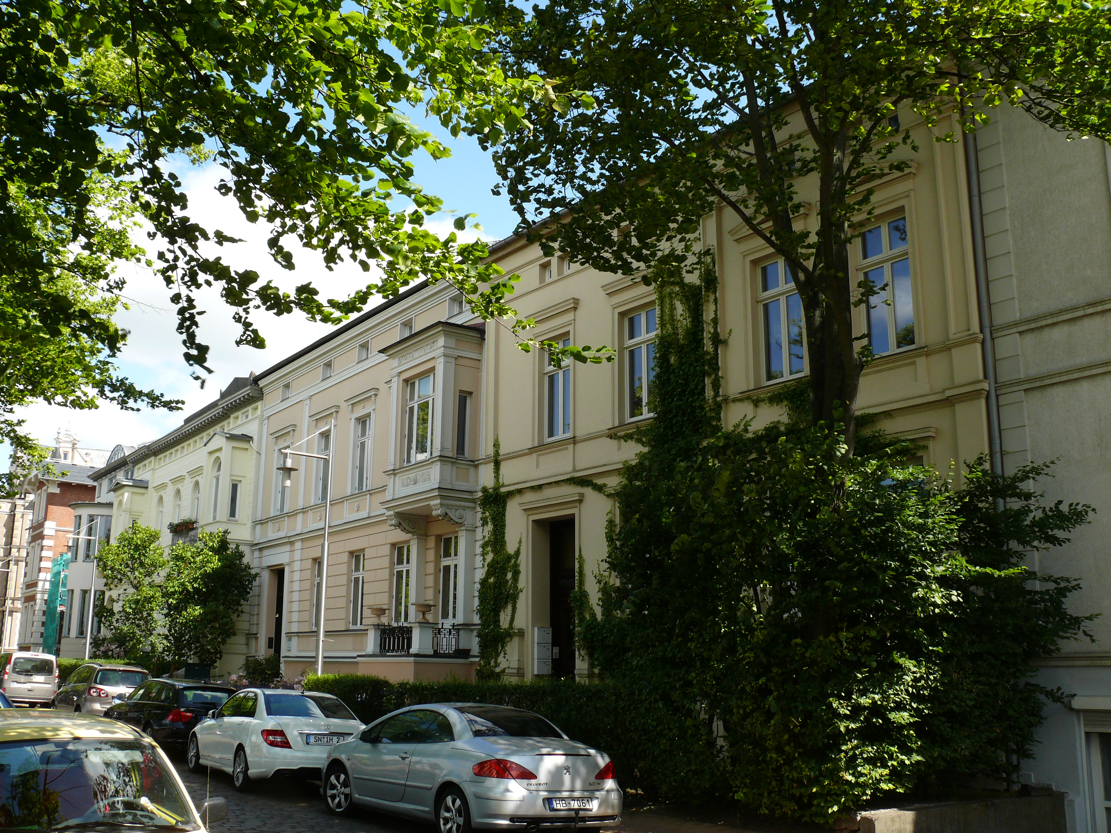 Die Gebäude "August-Bebel-Straße 13 (rechts) + 14 (links)" in Schwerin.